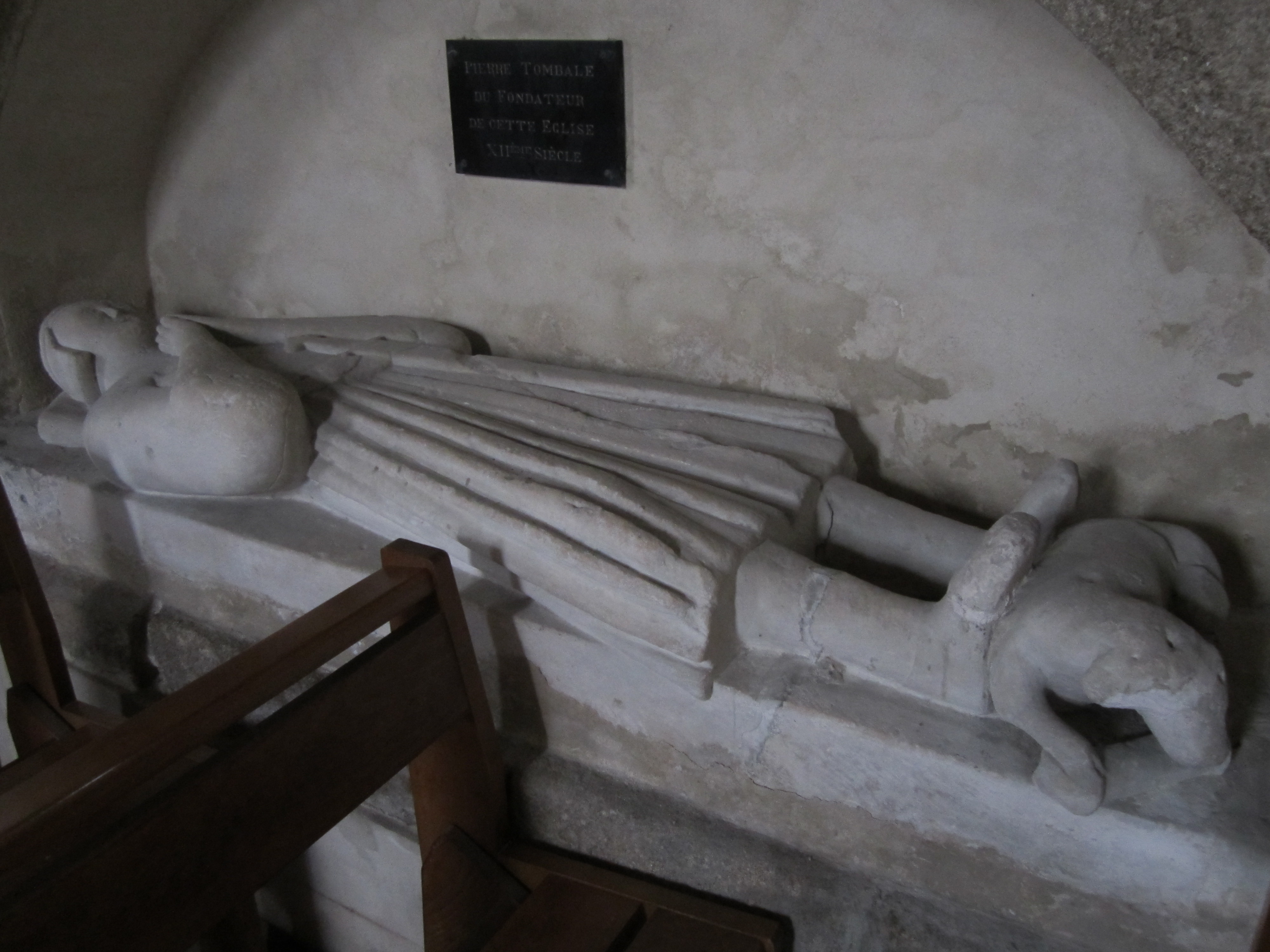 Yquelon, Manche